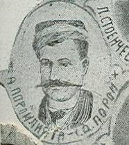 Алексо Поройлията.